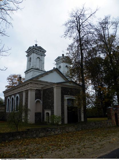 Kirche in Cibla